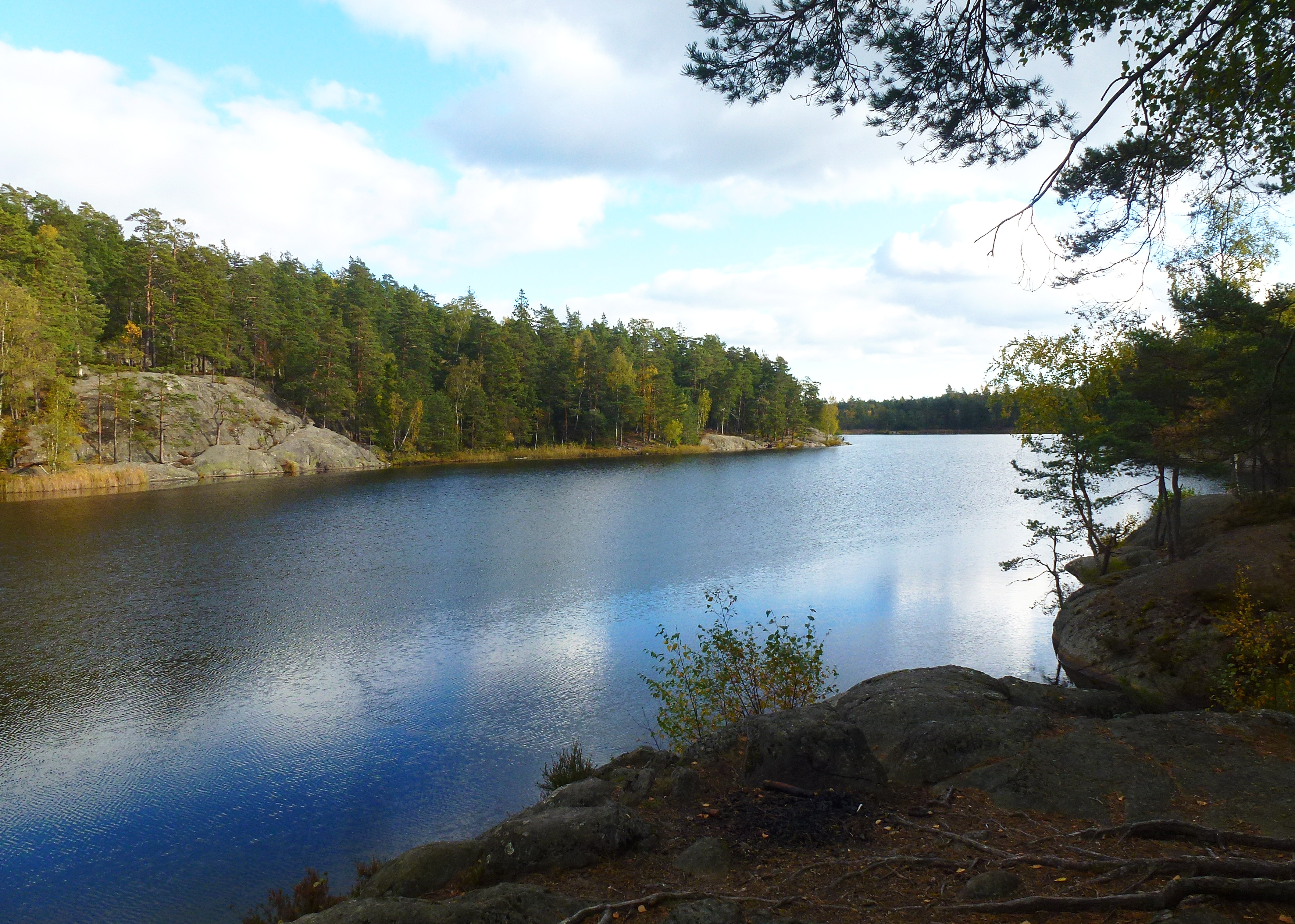 Sandasjön vid Älta